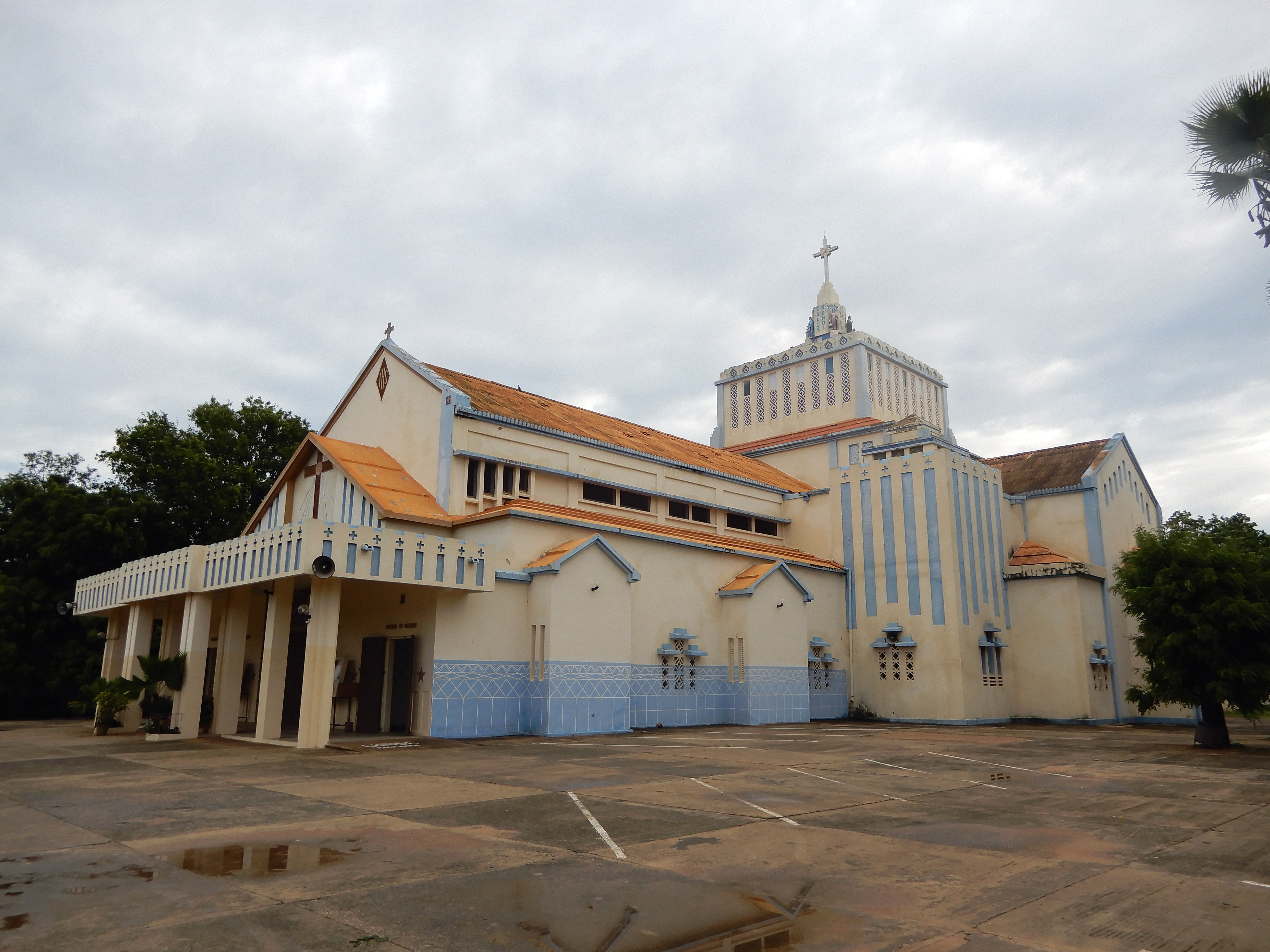 Cathédrale Saint-Anne de Thiès, au Sénégal, consacrée en 1945.